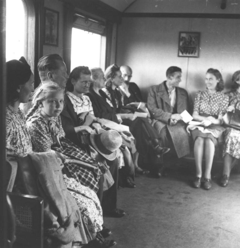 Sonderzug der Einwandererzentralstelle Sonderzug der Einwanderungszentralstelle zur Durchschleusung der Umsiedler: Warteraum